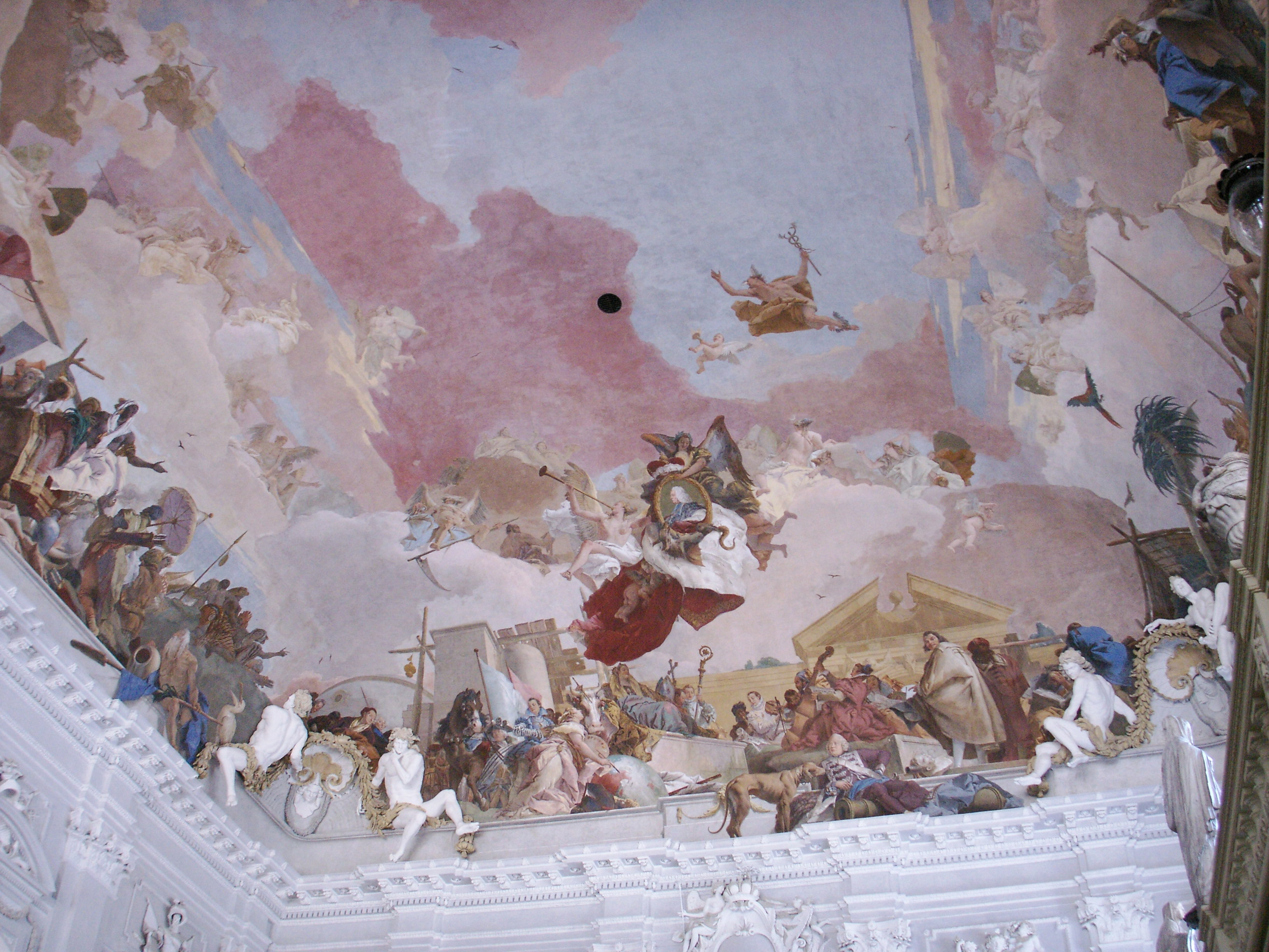 Deckenfresko, Treppenhaus, Residenz Würzburg — Tiepolo, 1750s.